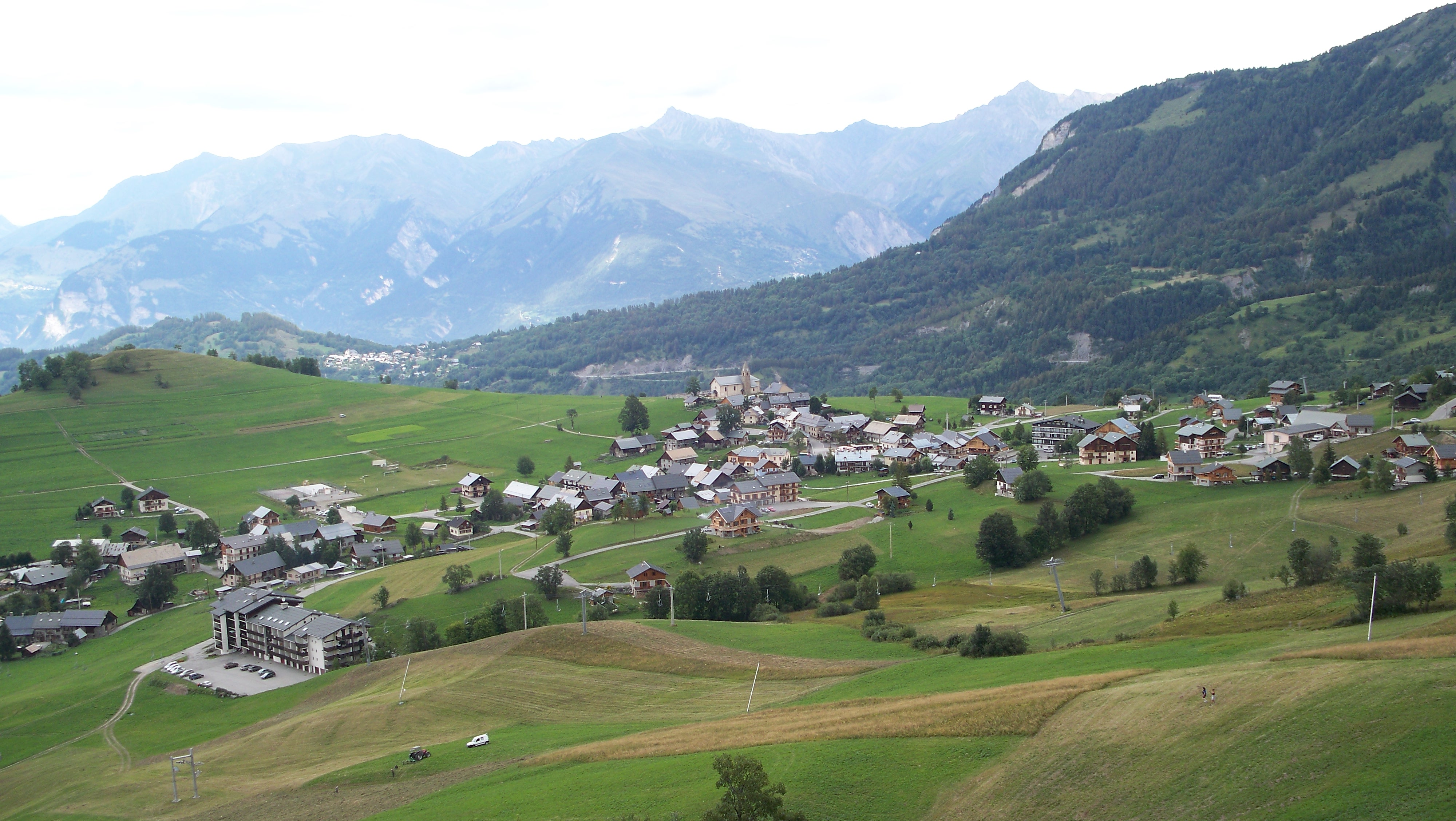 Vue d'ensemble du village d'Albiez-Montrond